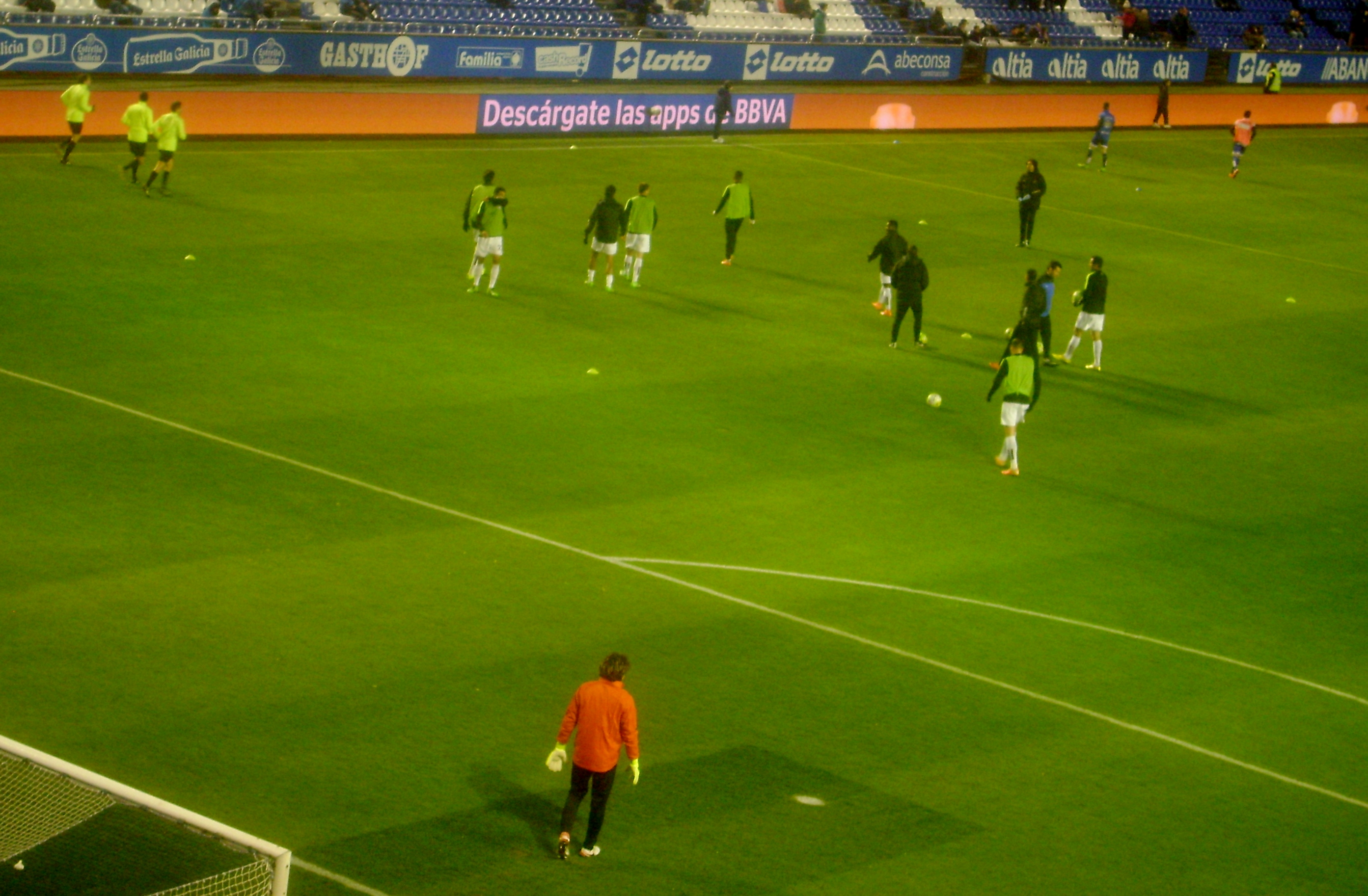 Jugadores del Málaga CF.